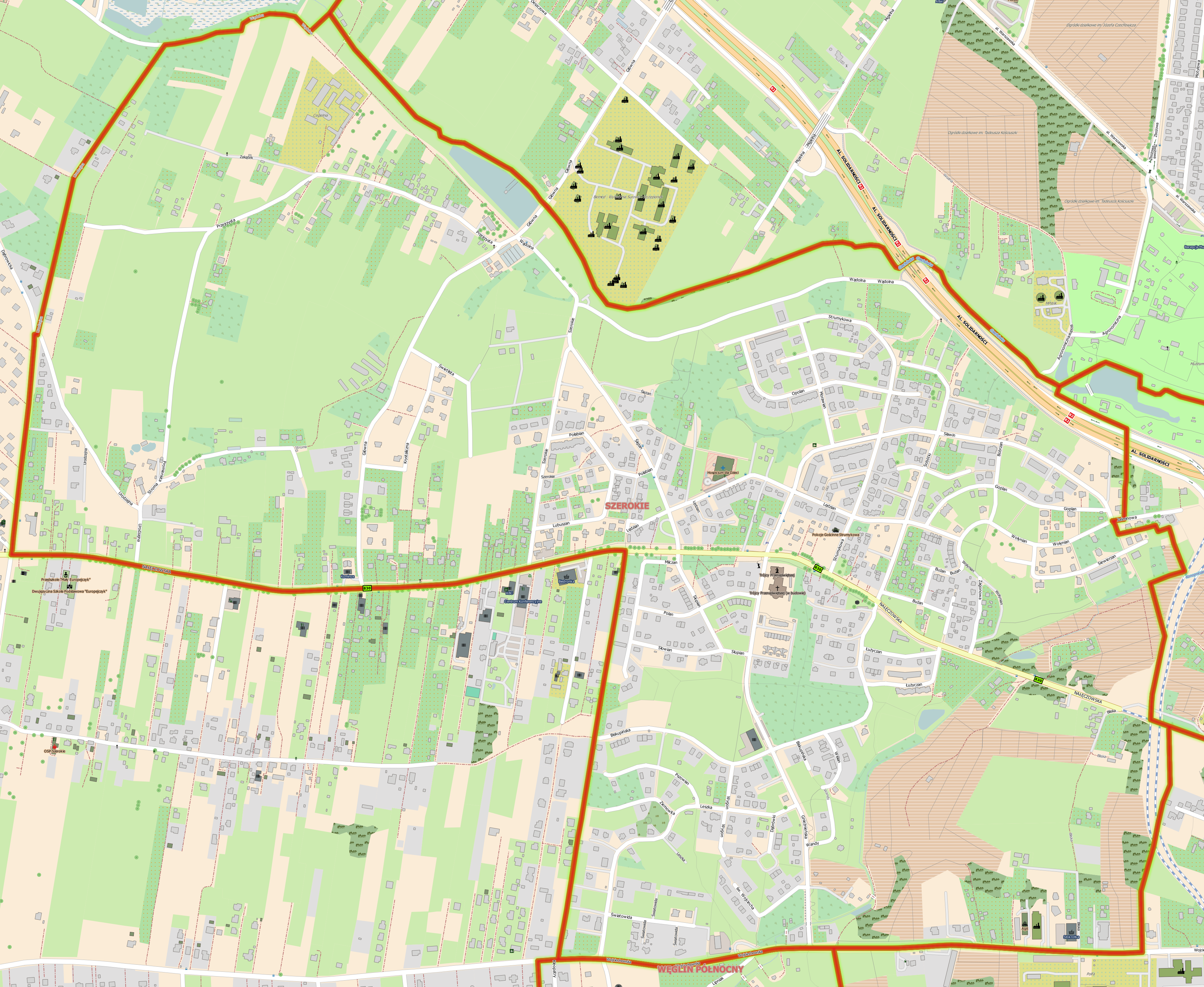 Plan dzielnicy Szerokie w Lublinie.